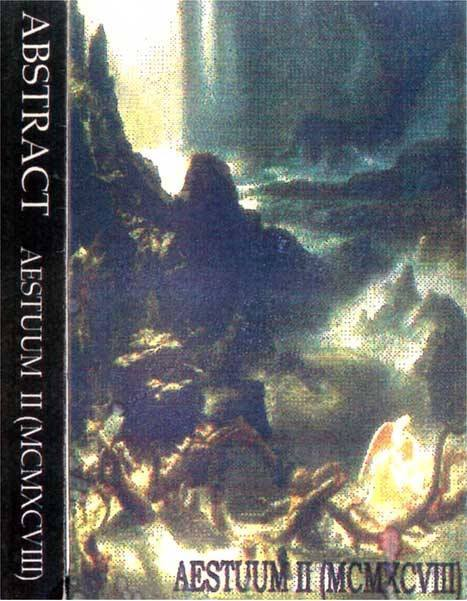 Predná strana obalu v poradí druhého demo albumu kapely Abstract z roku 1998 s názvom Aestuum II. (MCMXCVIII) .